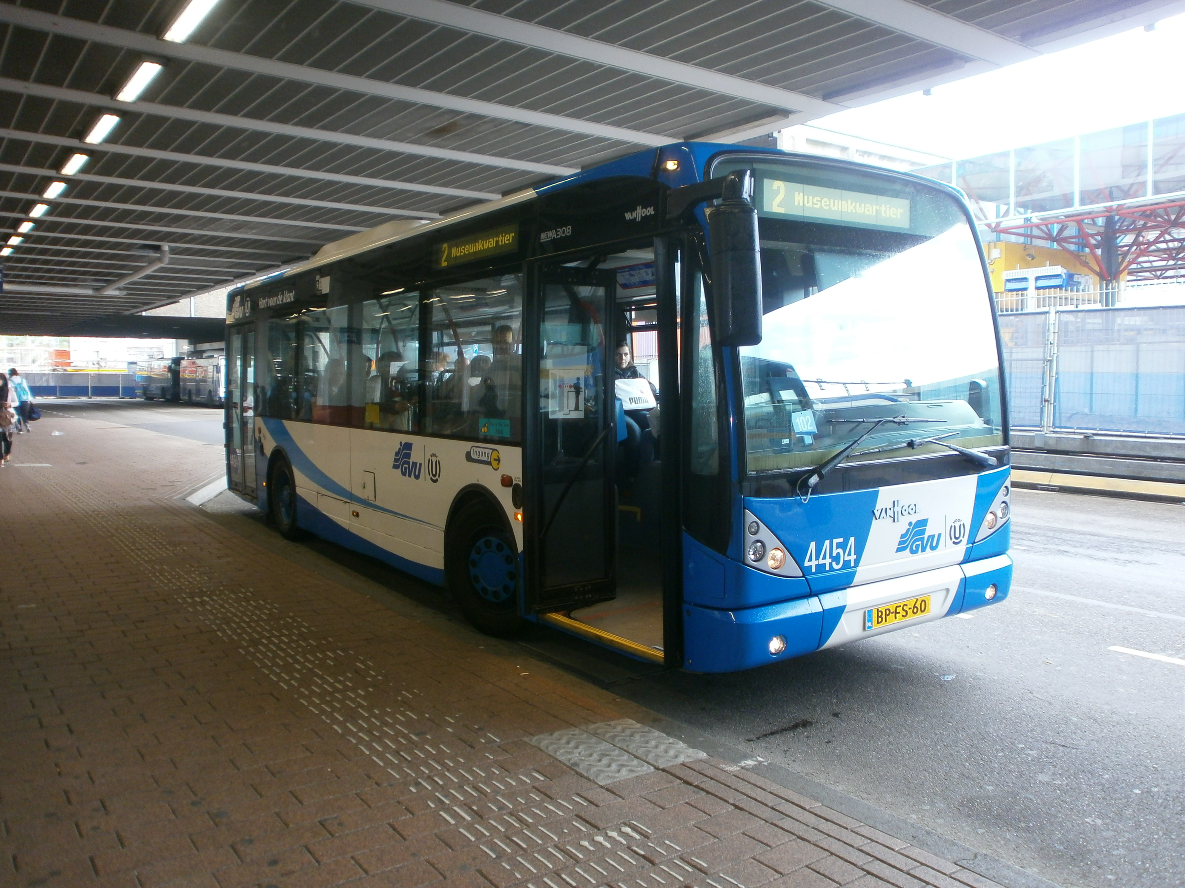 GVU 4454 Van Hool newA308 op station Utrecht